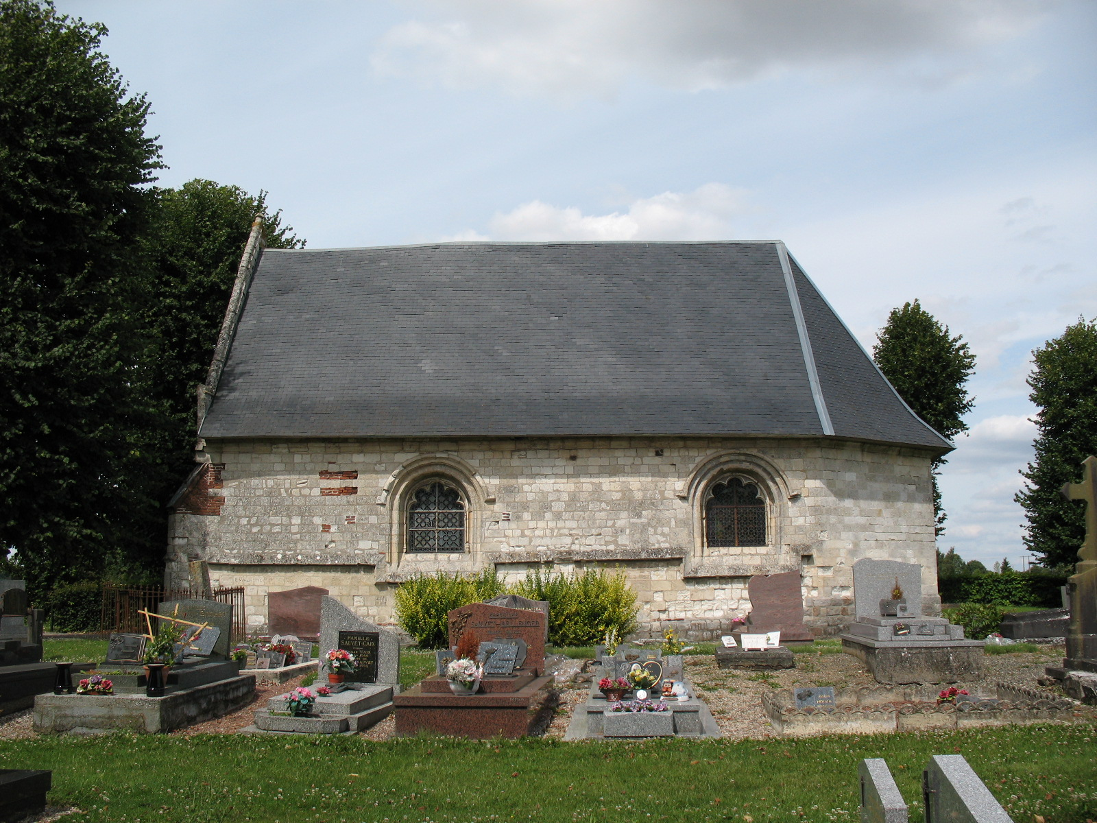 Chapelle Notre-Dame O Pie, de Pierregot, entourée de tombes anciennes et nouvelles.